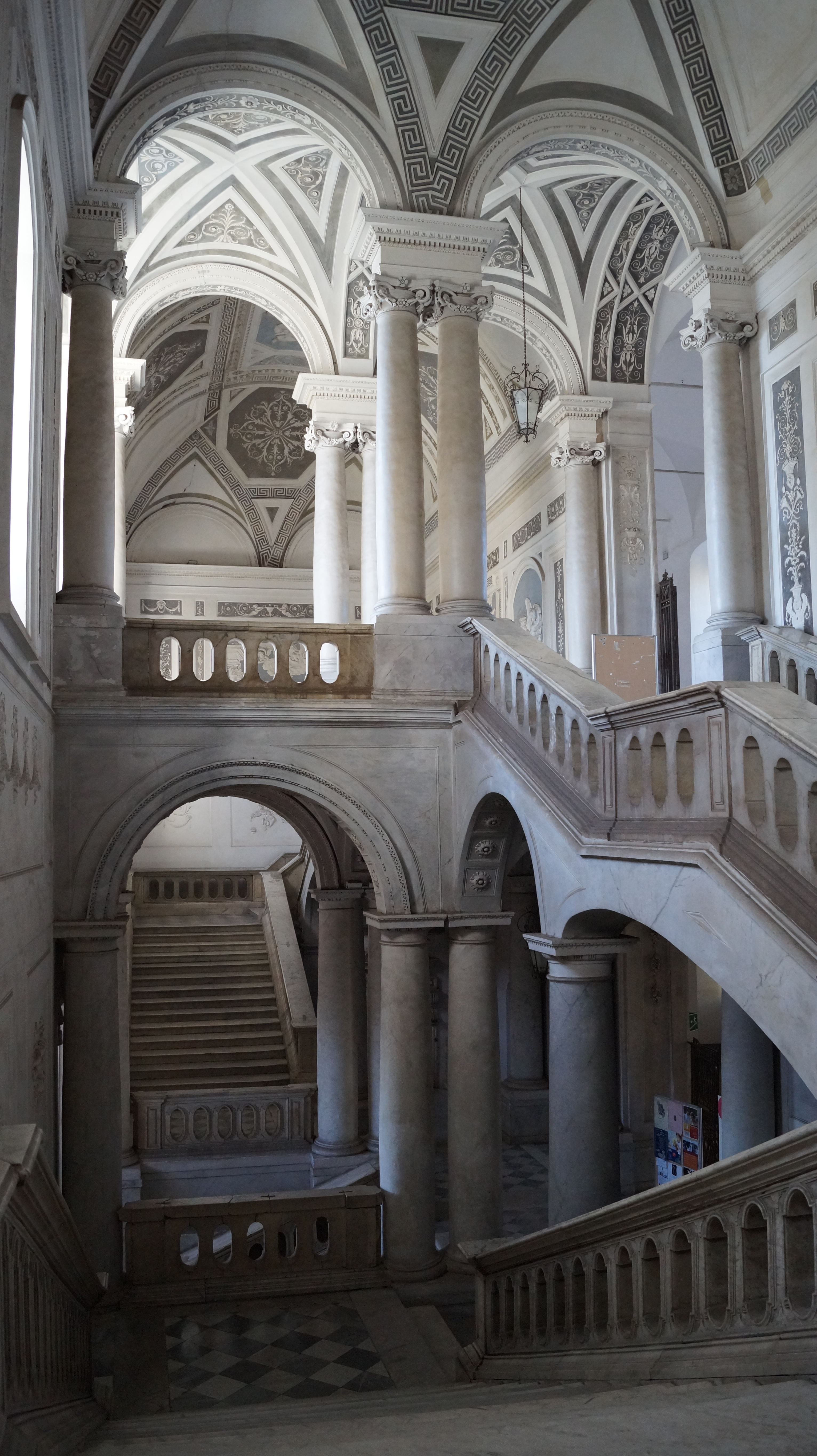 scalone a doppia rampa